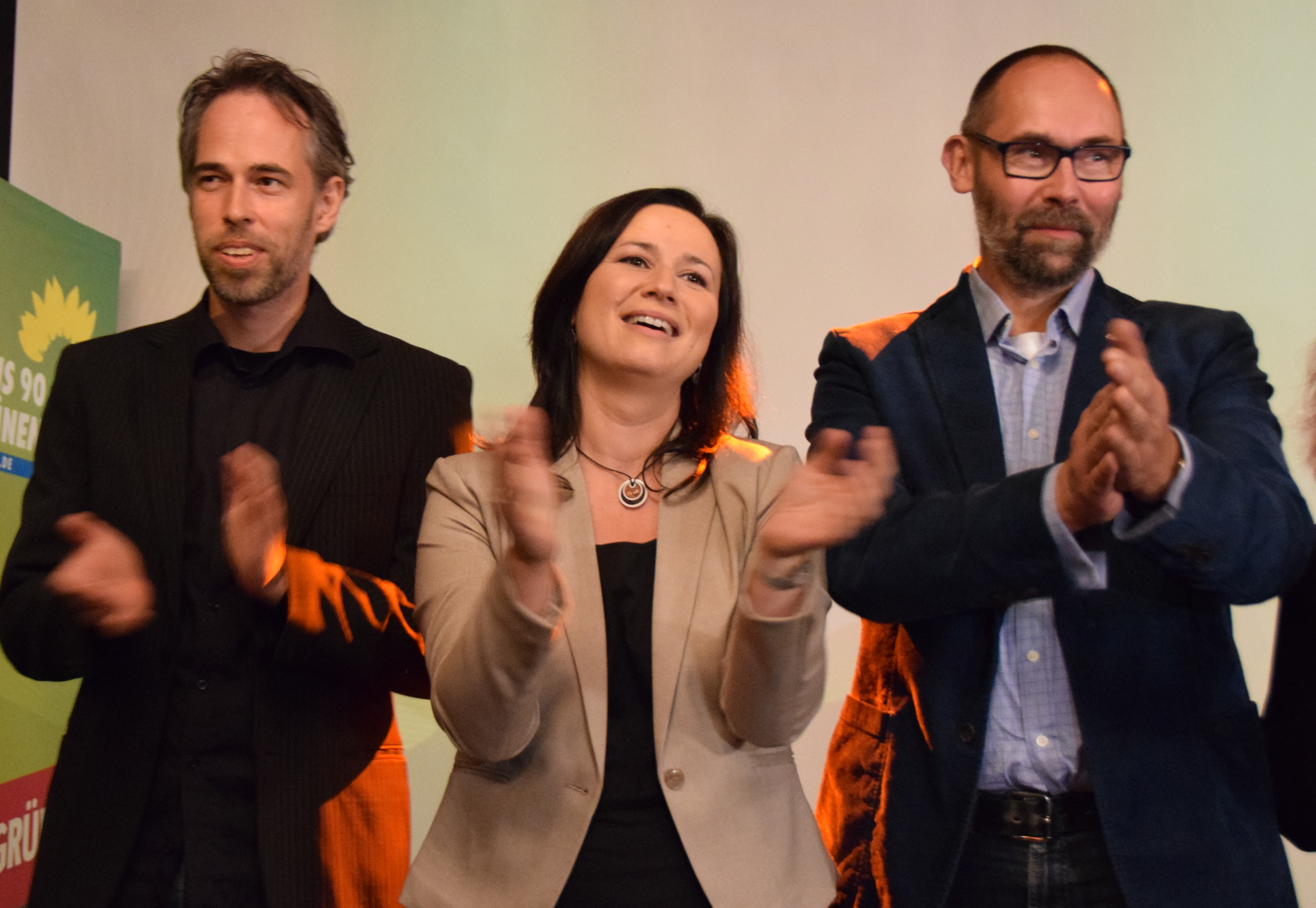 Landtagswahl Thüringen am 14. September 2014